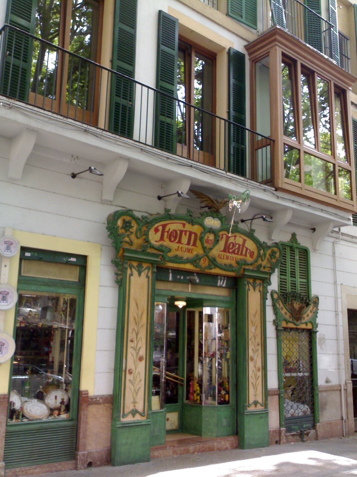 Forn del Teatre, la pastelería más antigua de Palma